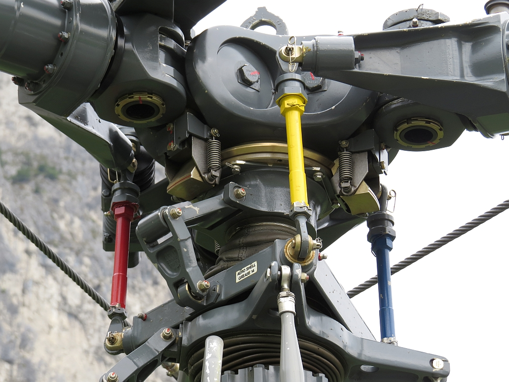 Aérospatiale SA-319 Alouette III Rotorkopf